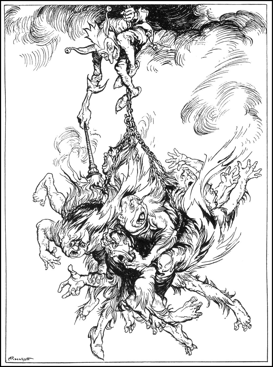 Иллюстрация Артура Рэкхема из книги "Poe's Tales of Mystery and Imagination" к рассказу Эдгара По "Прыг-Скок"